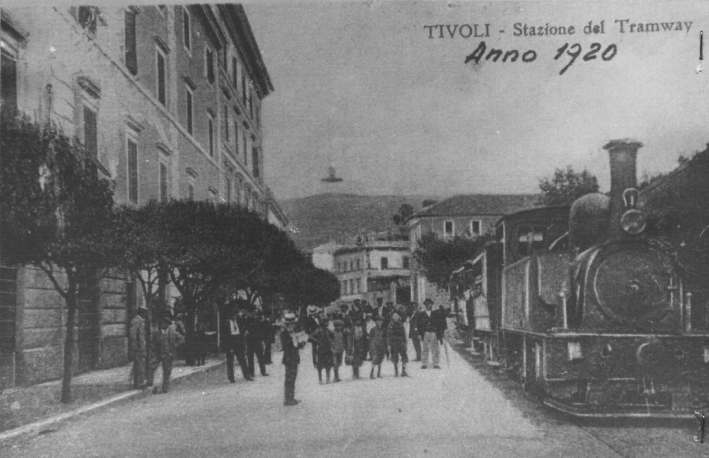 tram Roma-Tivoli